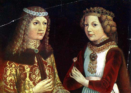 II. Lajos és menyasszonya, Ausztriai Mária. A gondos aprólékossággal deszkára festett kép, valamely osztrák festő (?) munkája, a két királyi gyermeket valószínűleg eljegyzésük idején (1515) ábrázolja. Akár eredeti, akár másolat, mindenesetre egykorú s arcképszerűen hű, eltekintve attól, hogy a festő érthető okokból igyekezett az ábrázolt fejedelmi személyiségeket előnyösen feltüntetni